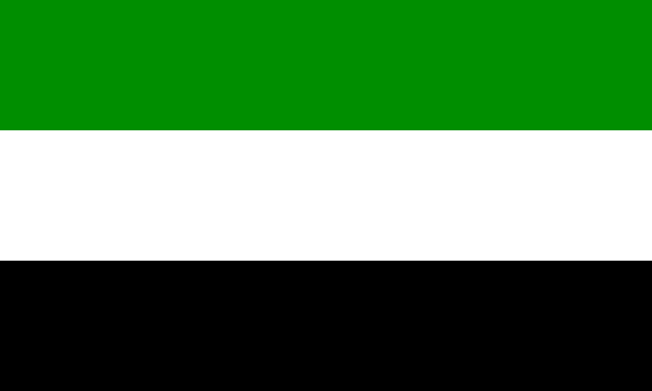 Flagge der westfälischen Verbinungen, wie z.B. Corps Guestphalia Halle, Corps Guestphalia Heidelberg, Corps Guestfalia Greifswald , Corps Guestphalia Bonn, Corps Guestphalia Berlin, Corps Hildeso-Guestphalia Göttingen); teilweise finden sie sich auch in anderen Korporationsverbänden, wie z.B. AV Guestfalia Tübingen